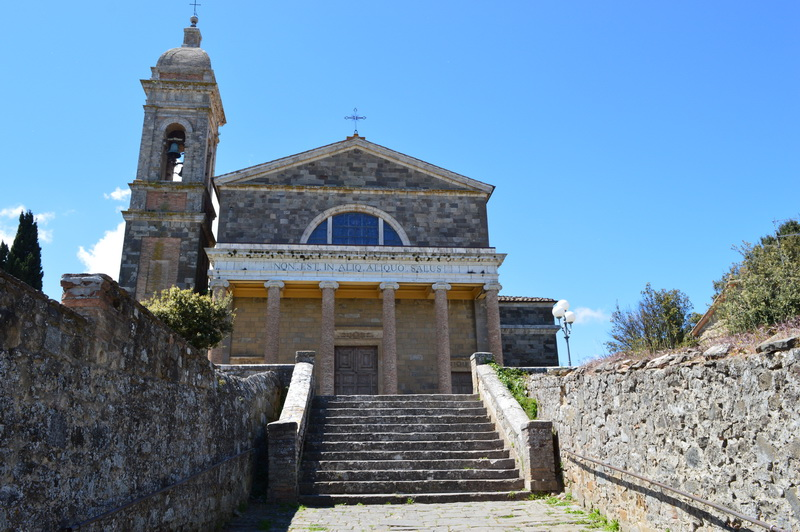 Собор Монтальчино